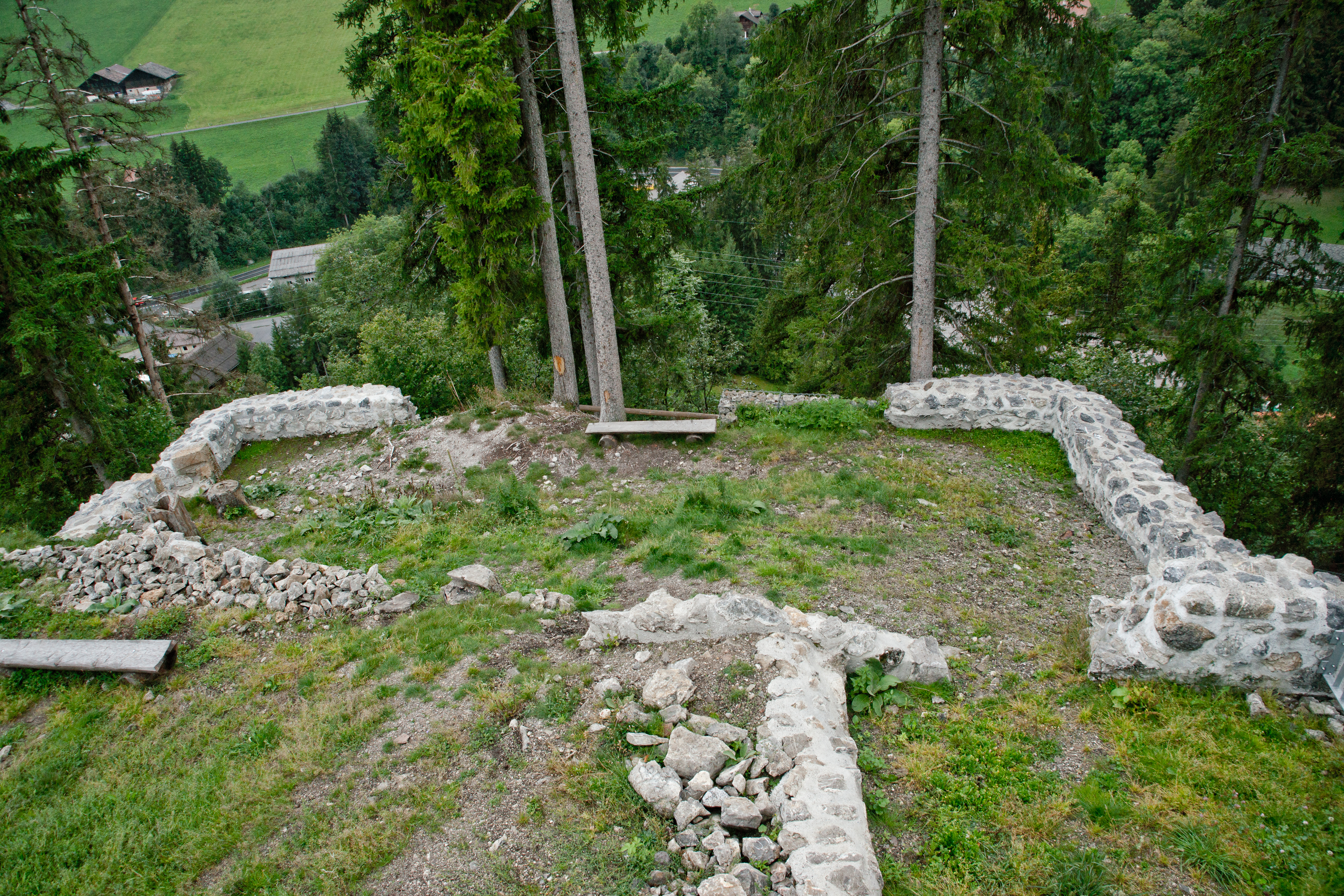 Ruines du château Unterer Mannenberg à Zweisimmen, canton de Berne.